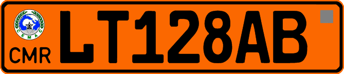 Схематичне зображення номерного знаку